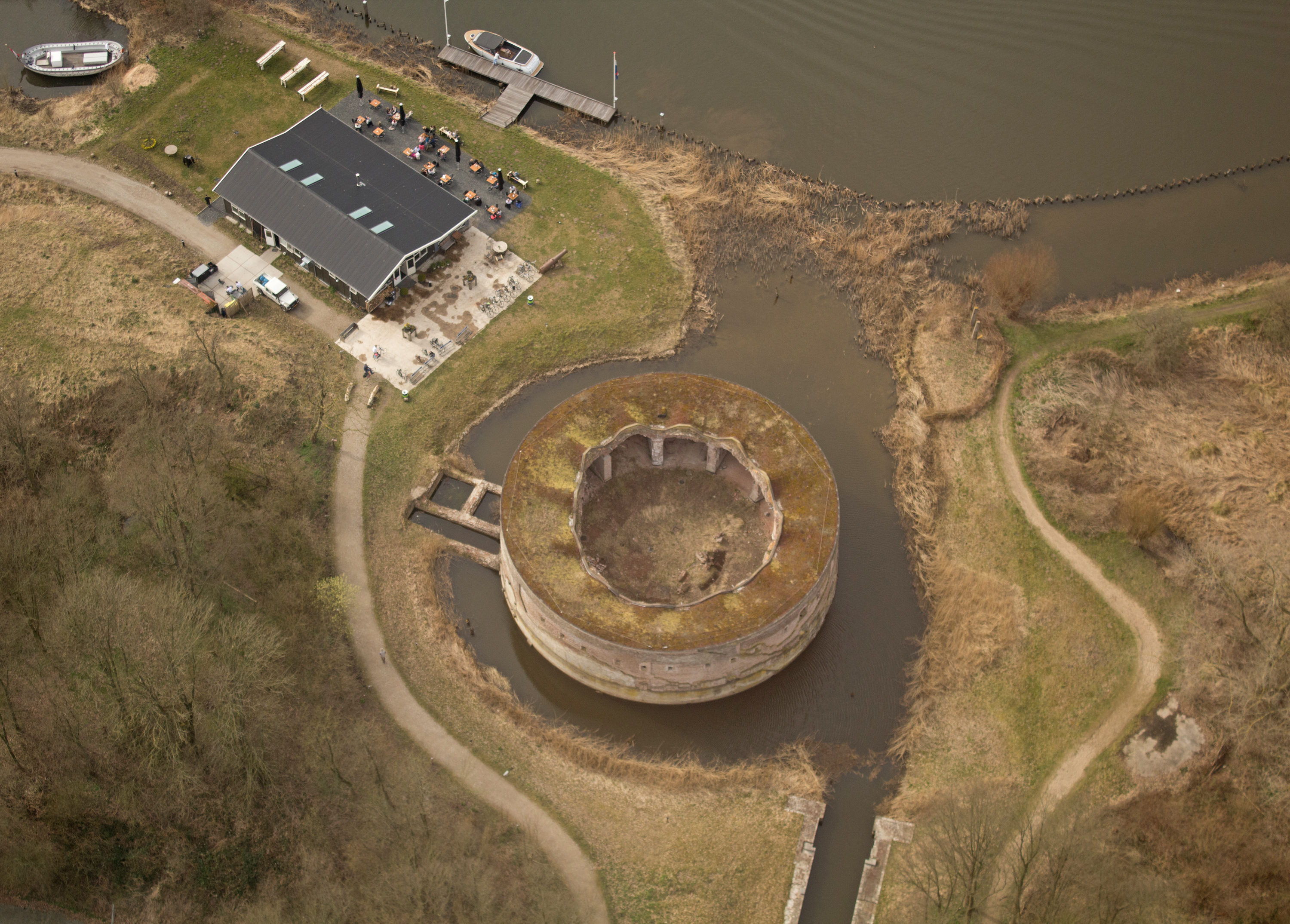 Fort Uitermeer, Weesp. Met dank aan Jeroen Komen.